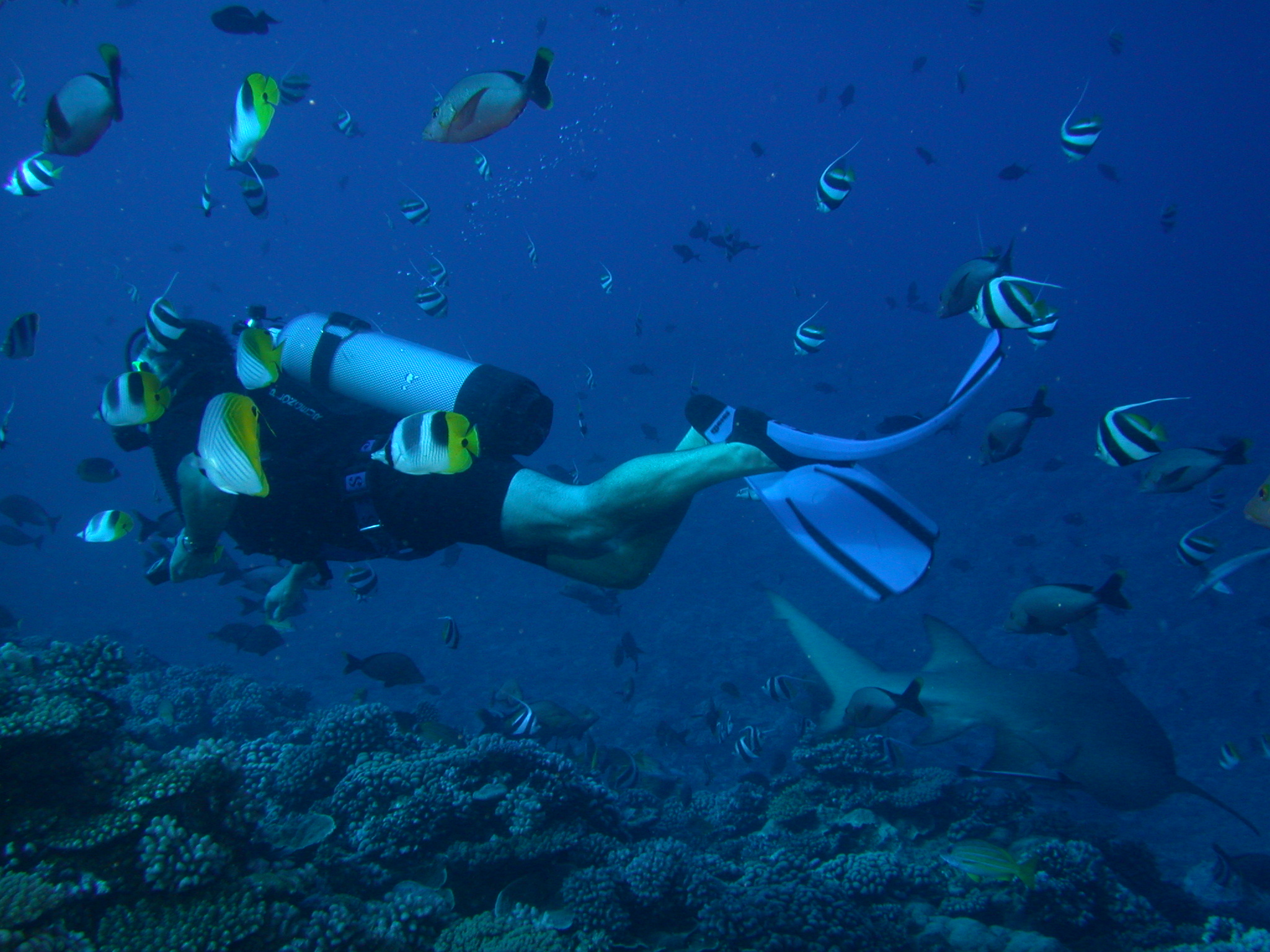 Hpm 03:22, 25 March 2006 (UTC)